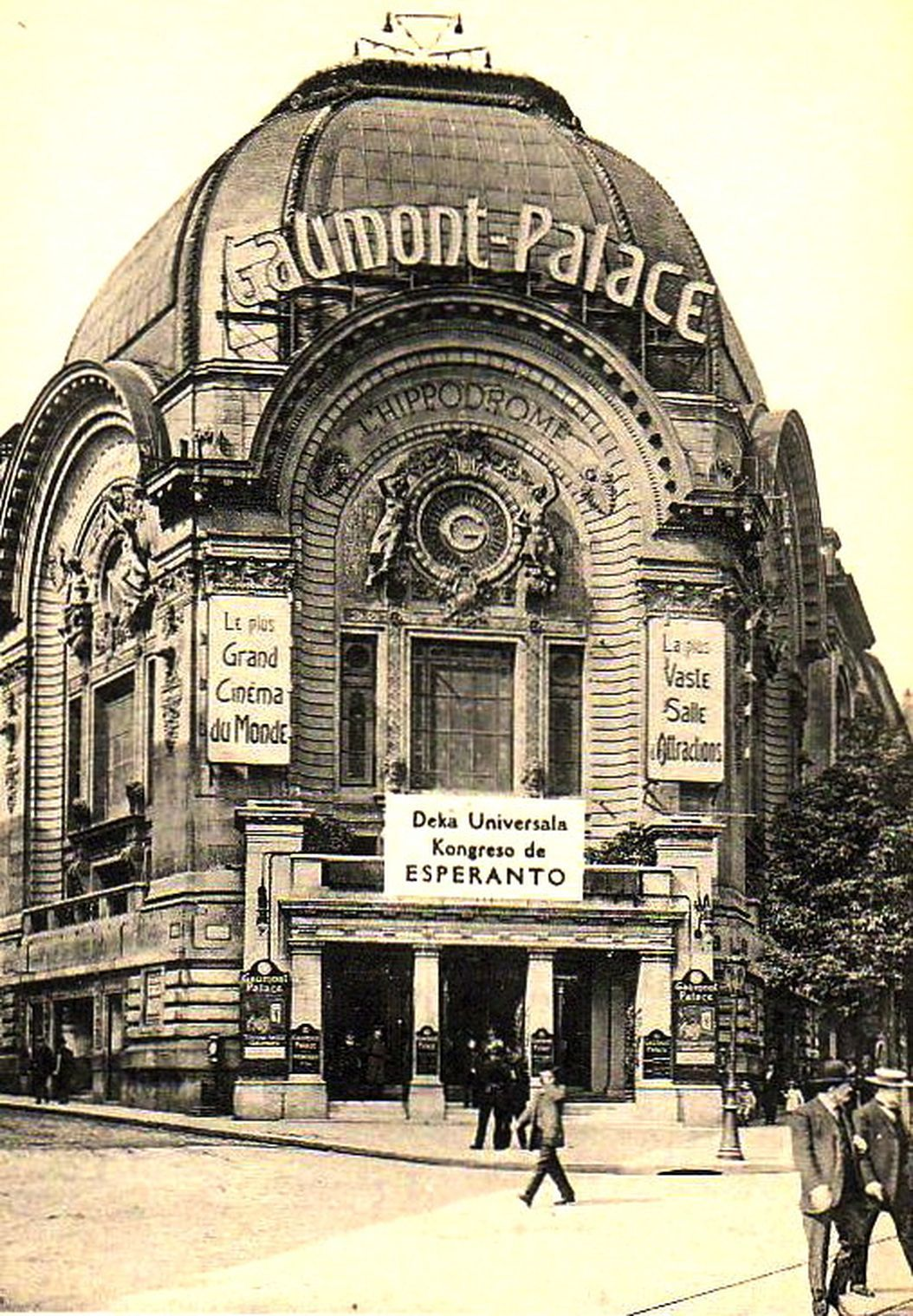 Le cinéma Gaumont Palace à Paris en 1914